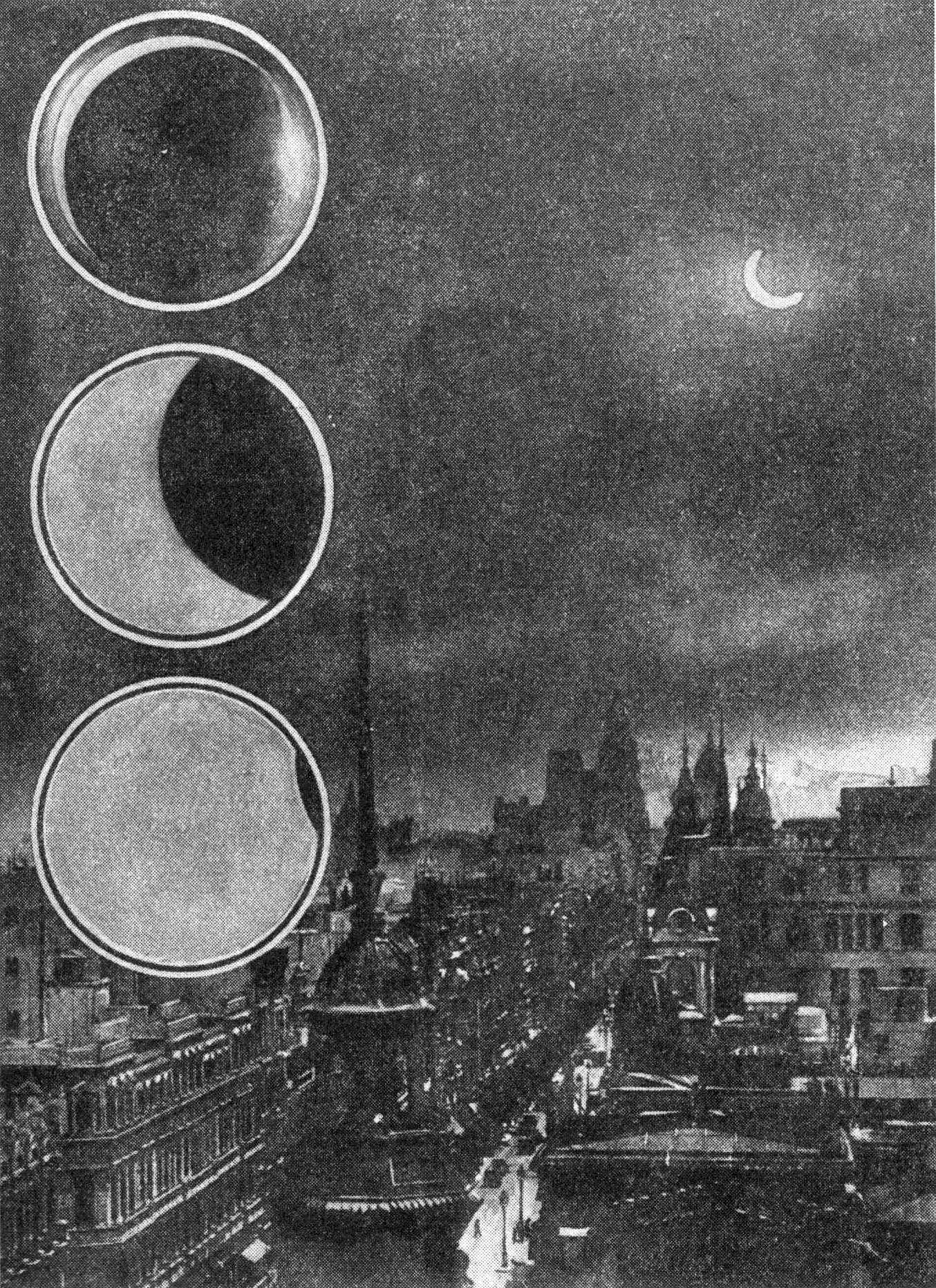 Eclipse solar observado en Buenos Aires el 3 de enero de 1927. Tres aspectos del mismo.